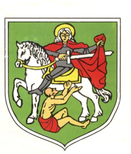 Herb gminy Pacanów